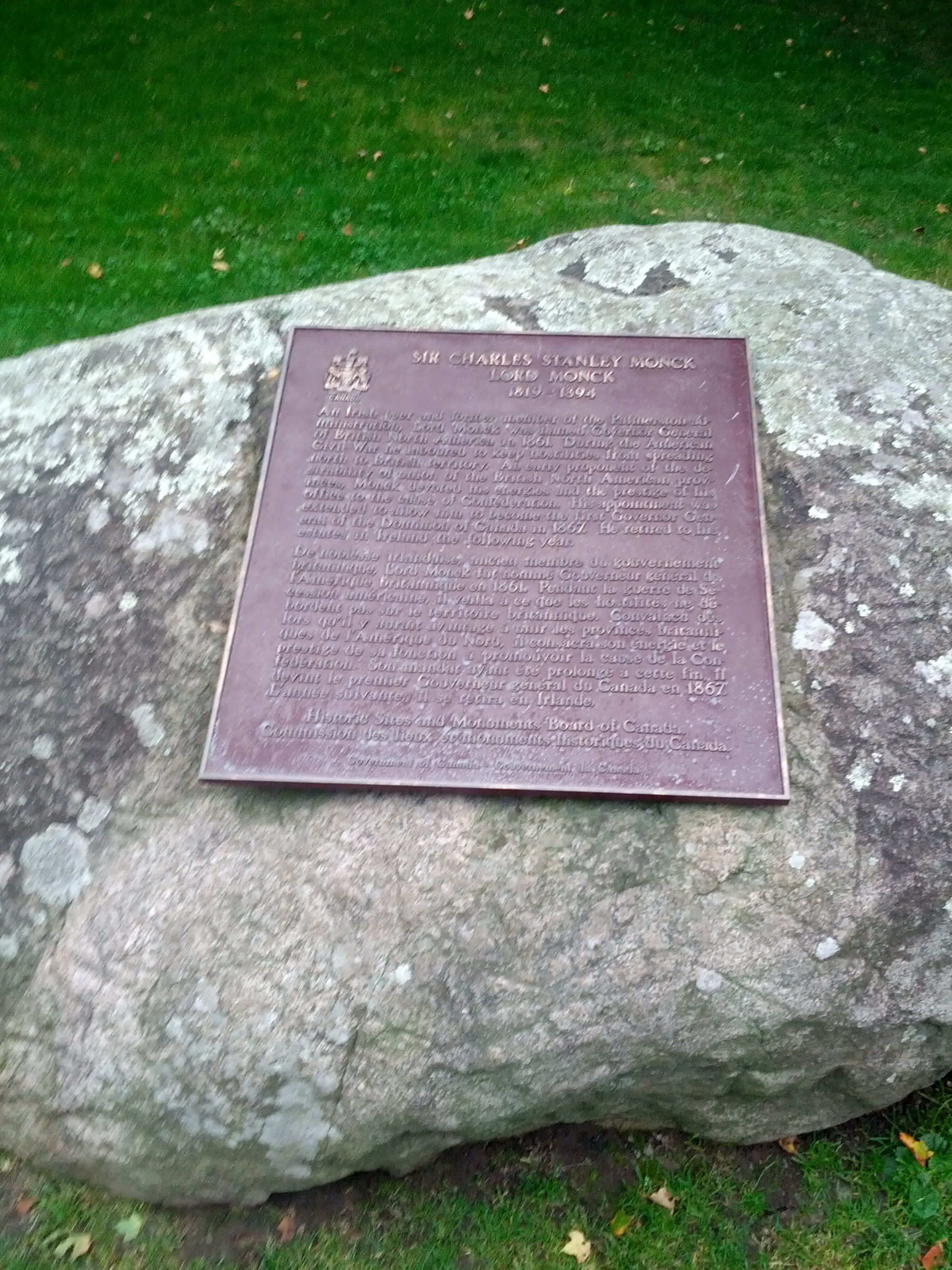 Sign about Charles Monck in Ottawa.